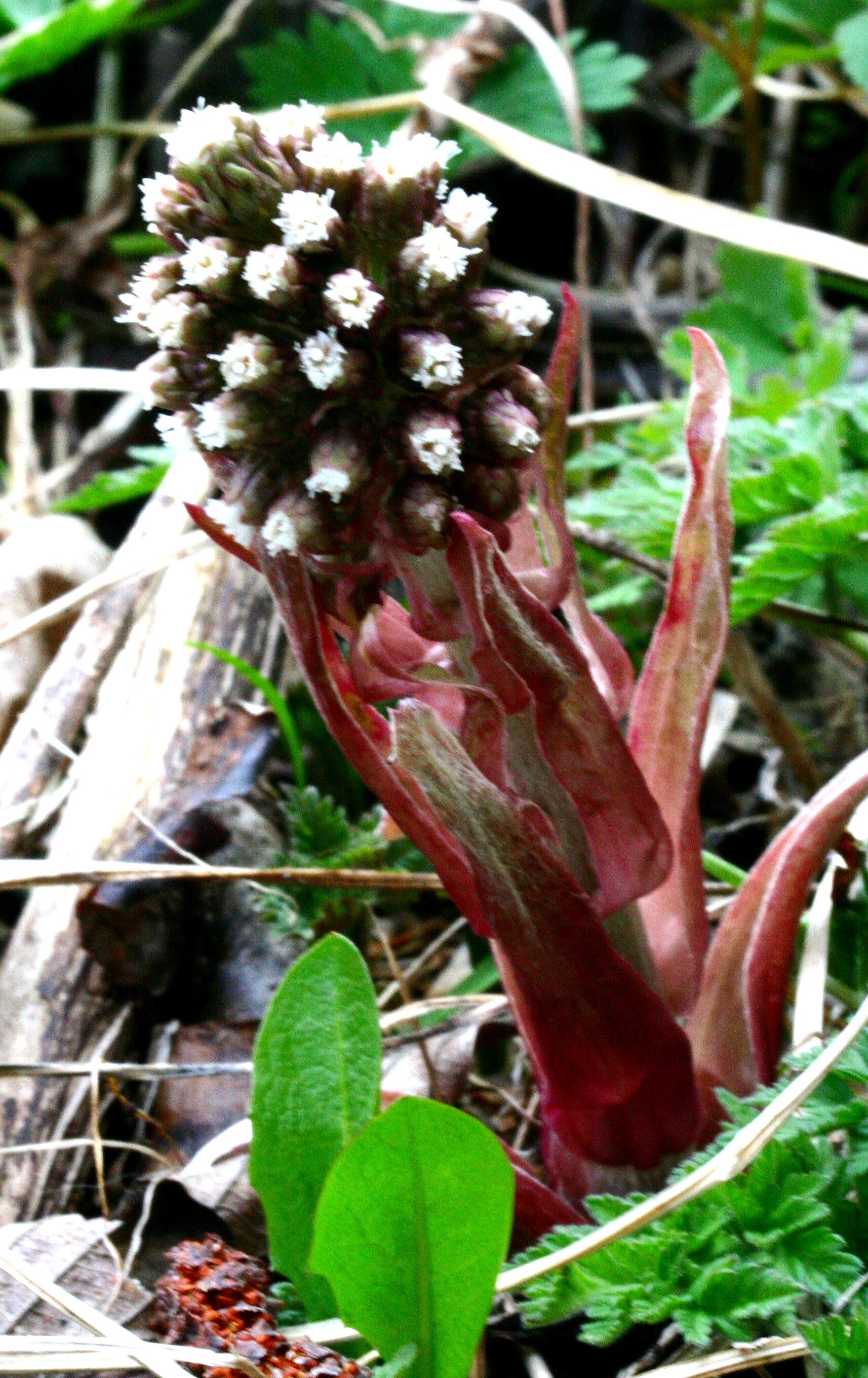 Farfaraccio maggiore - Località : Valle di San Lucano, Taibon Agordino (BL), 843 m s.l.m.